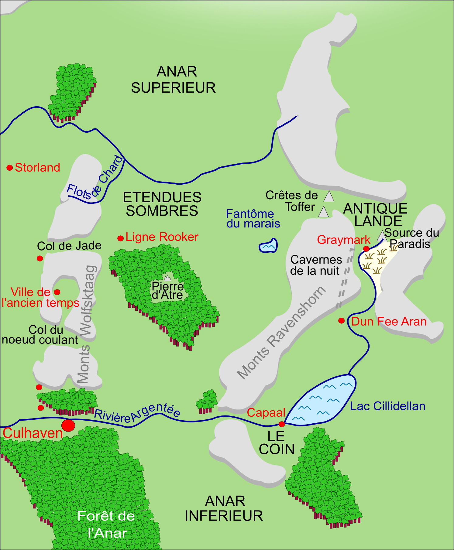 Terres de l'est - Shannara version 2